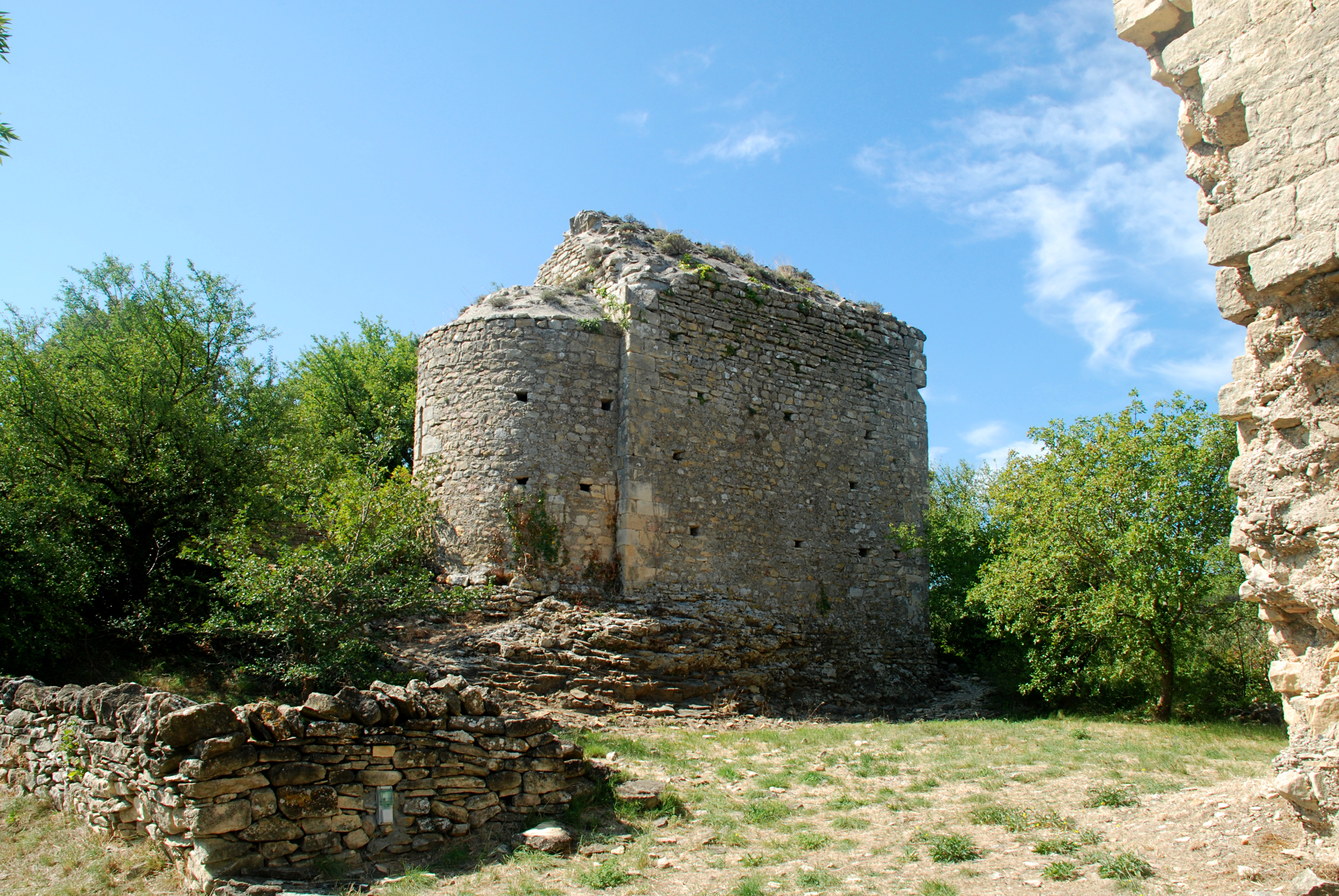 France - Gard - Saint-Étienne-des-Sorts - Chapelle Saint-Pierre